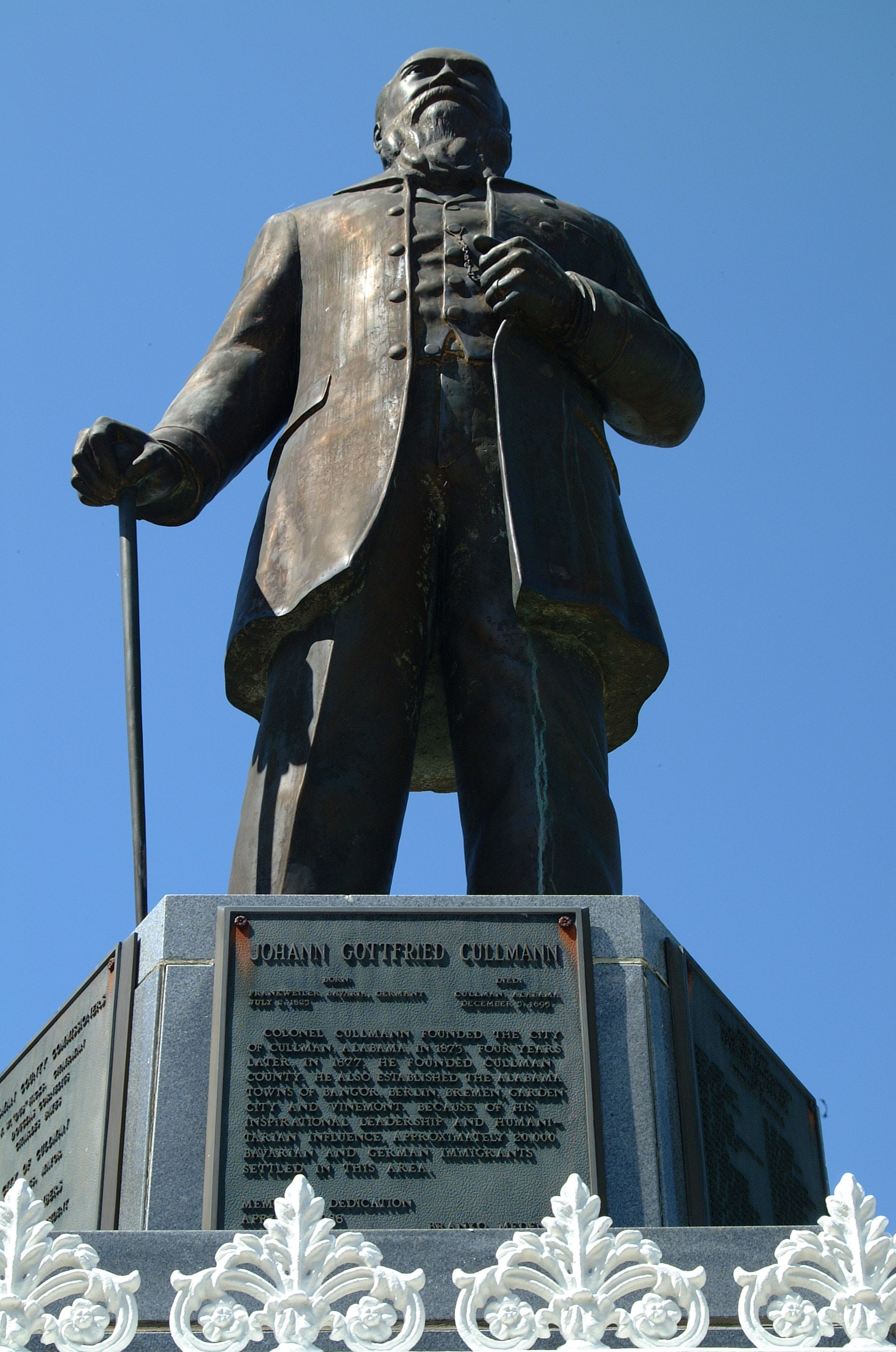 Johann "John" Godfried Cullmann